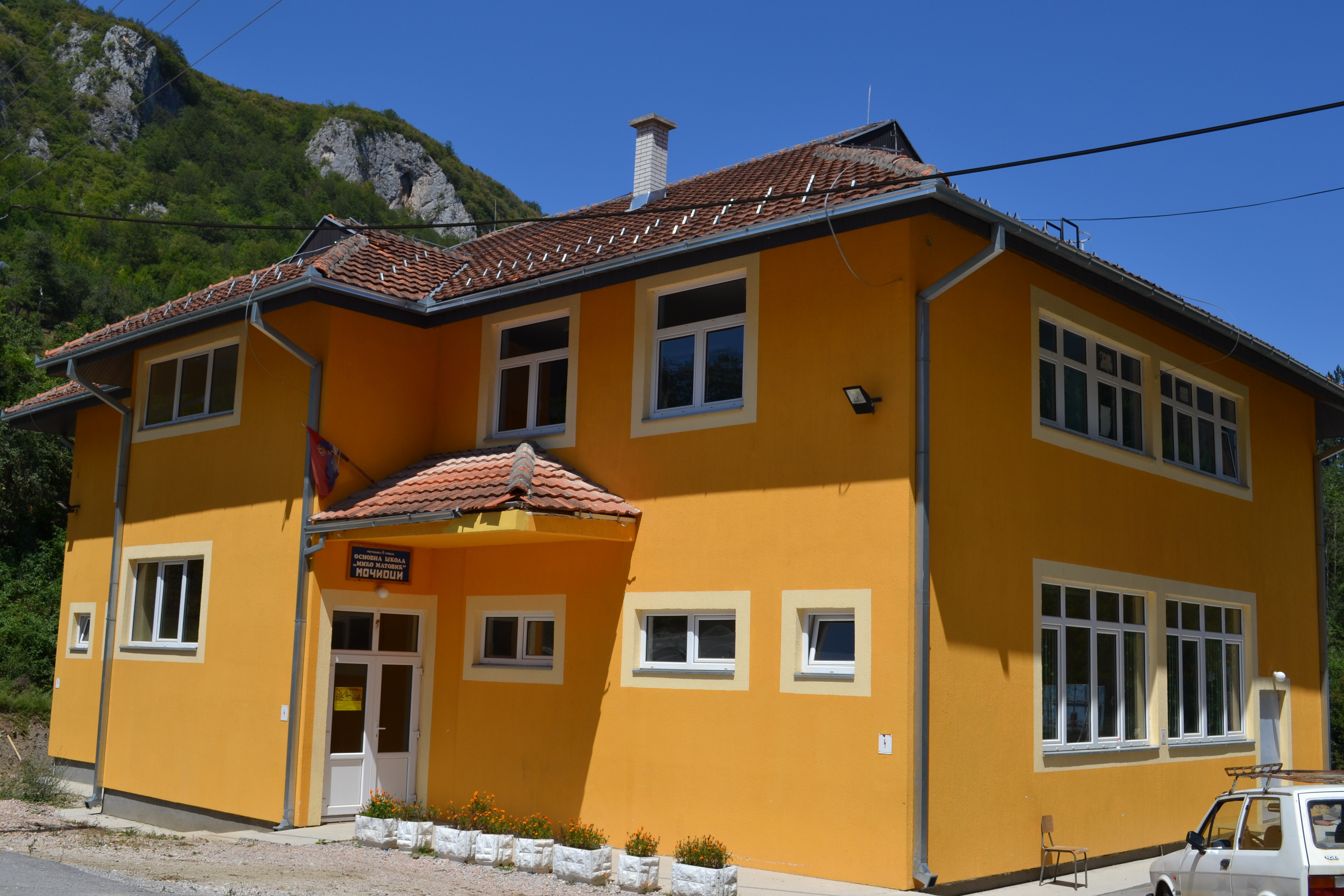 Škola u Močiocima